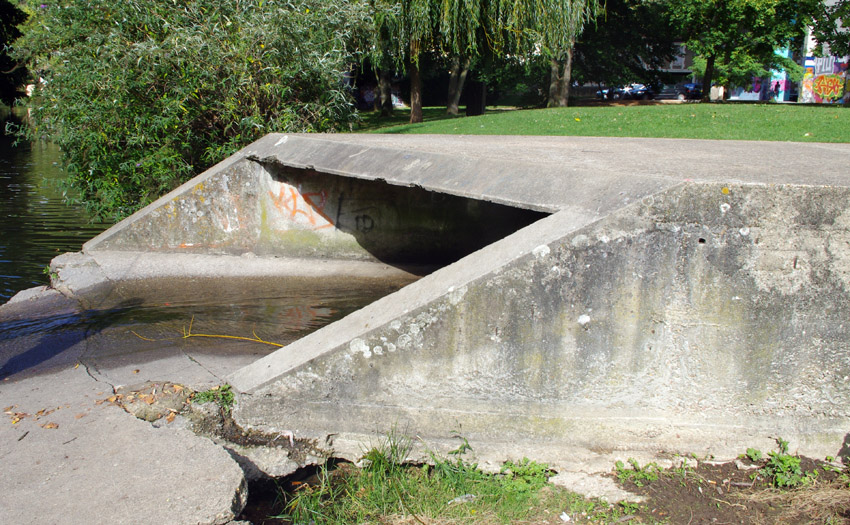 Source se déversant dans le Clain à Poitiers, canalisée